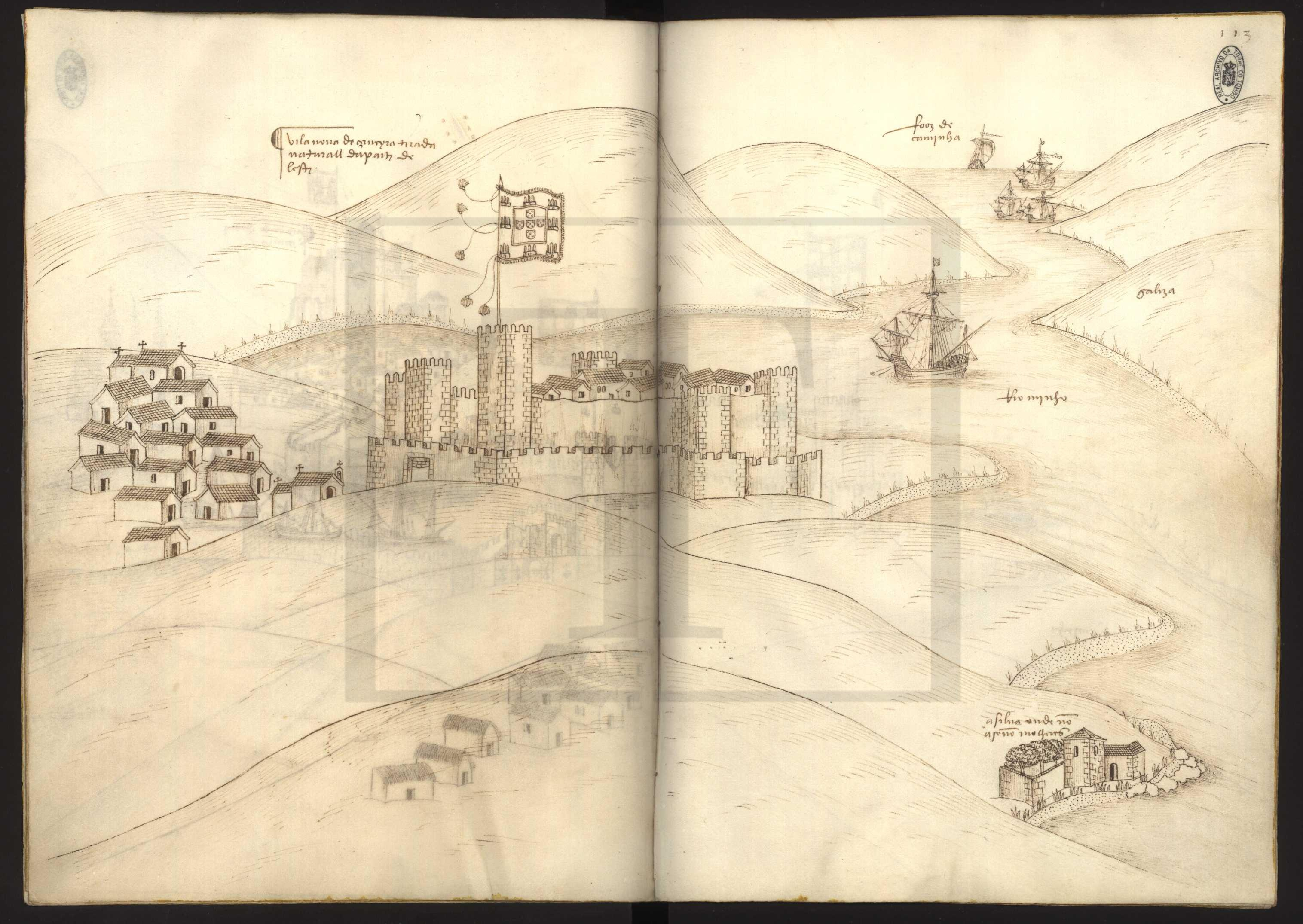 Livro das Fortalezas 113 - Vila Nova de Cerveira